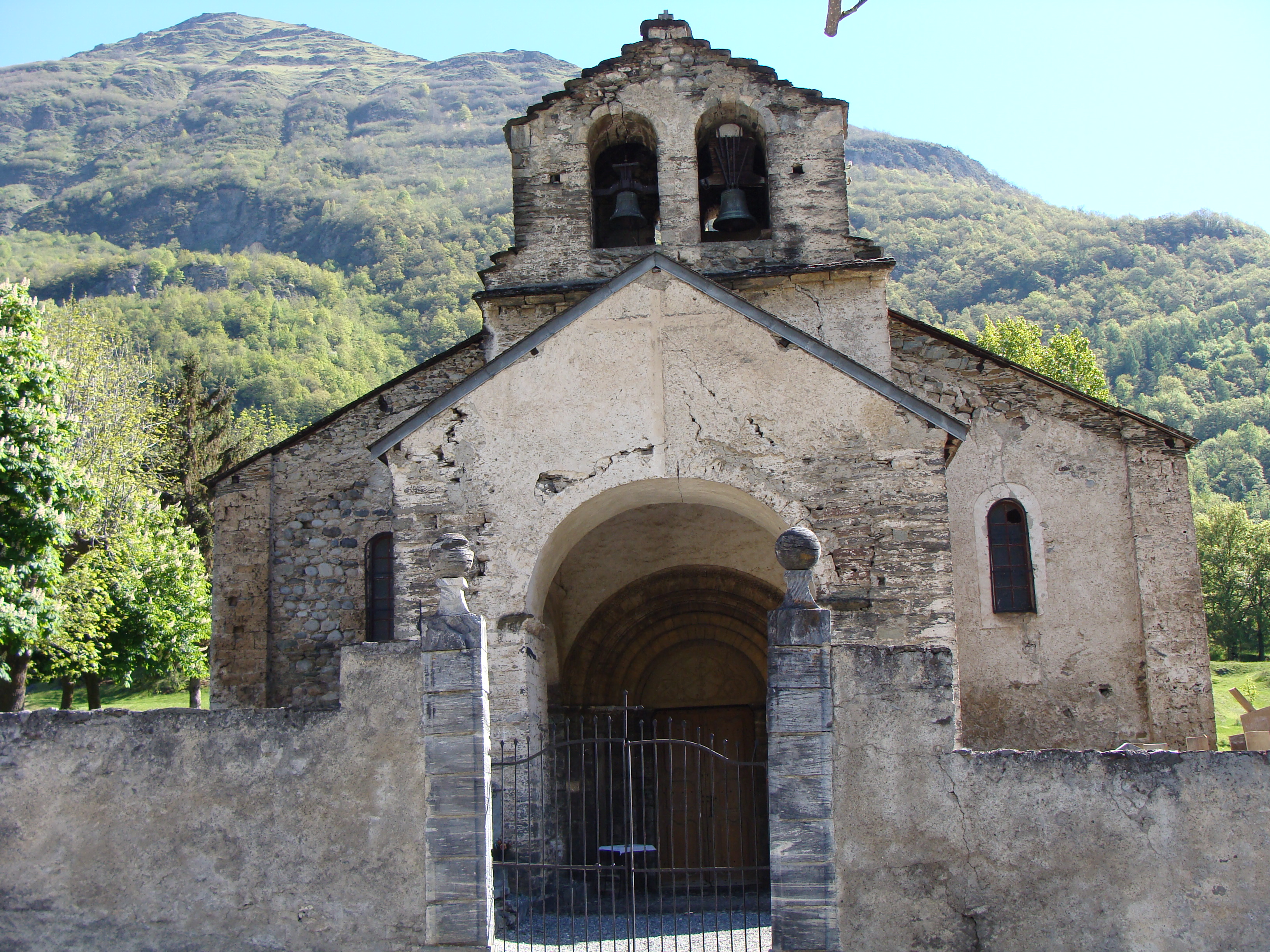 Esquièze-Sère Eglise de Sère